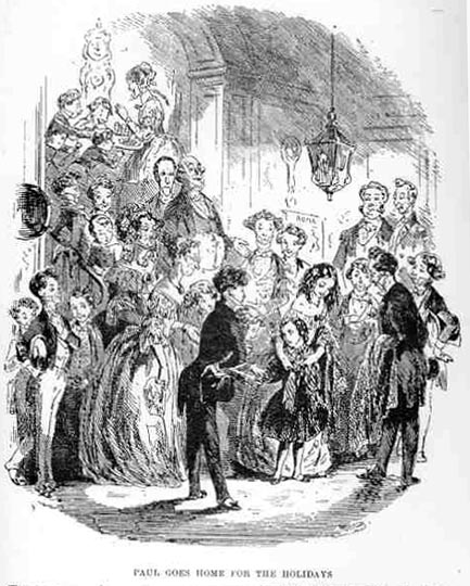 Dombey and Son, Le Petit Paul se prépare à partir en vacances et quitter l'institution de Mr Blimber à Brighton (chapitre 14)